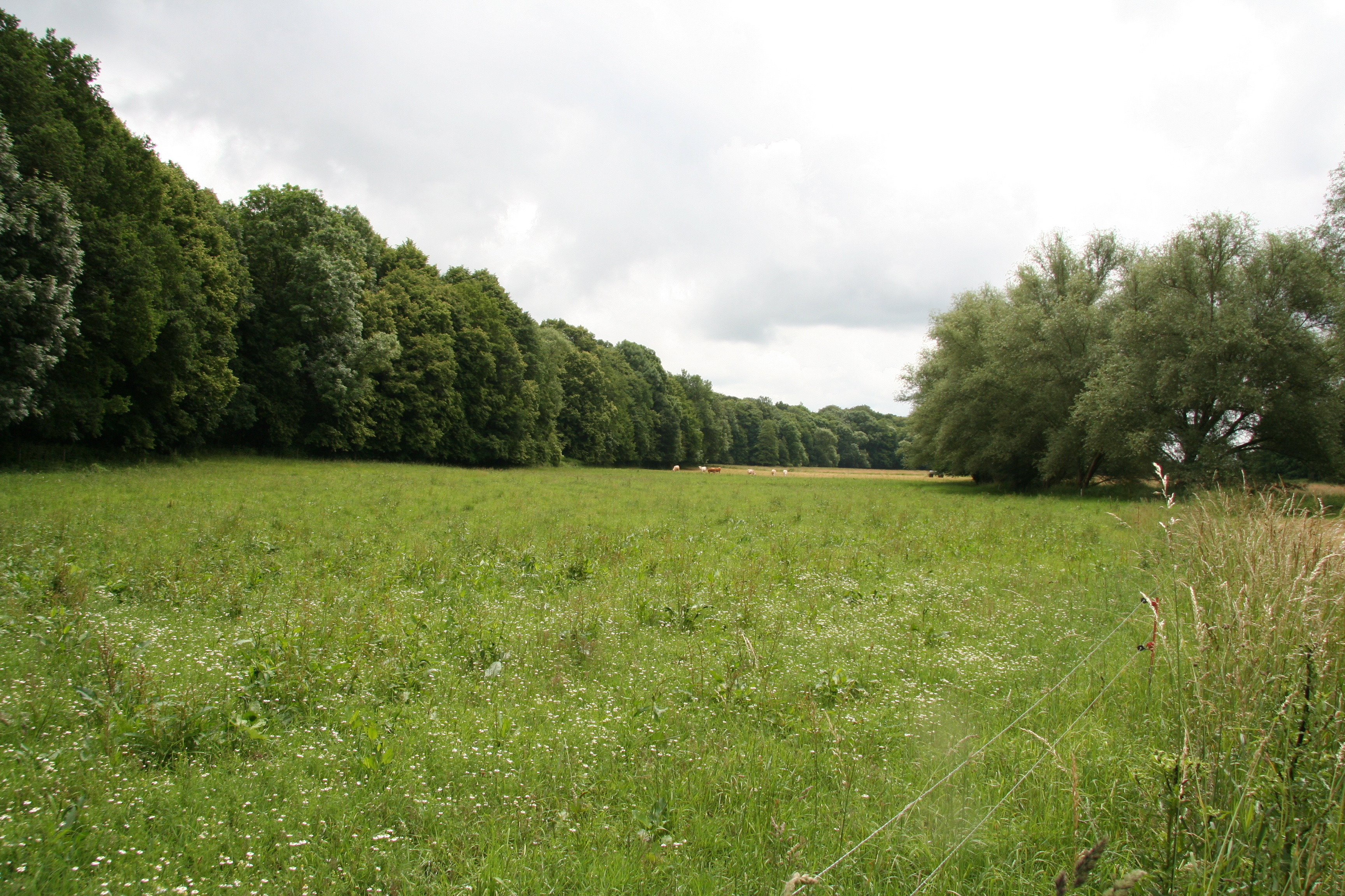 Im FFH-Gebiet Prießnitz